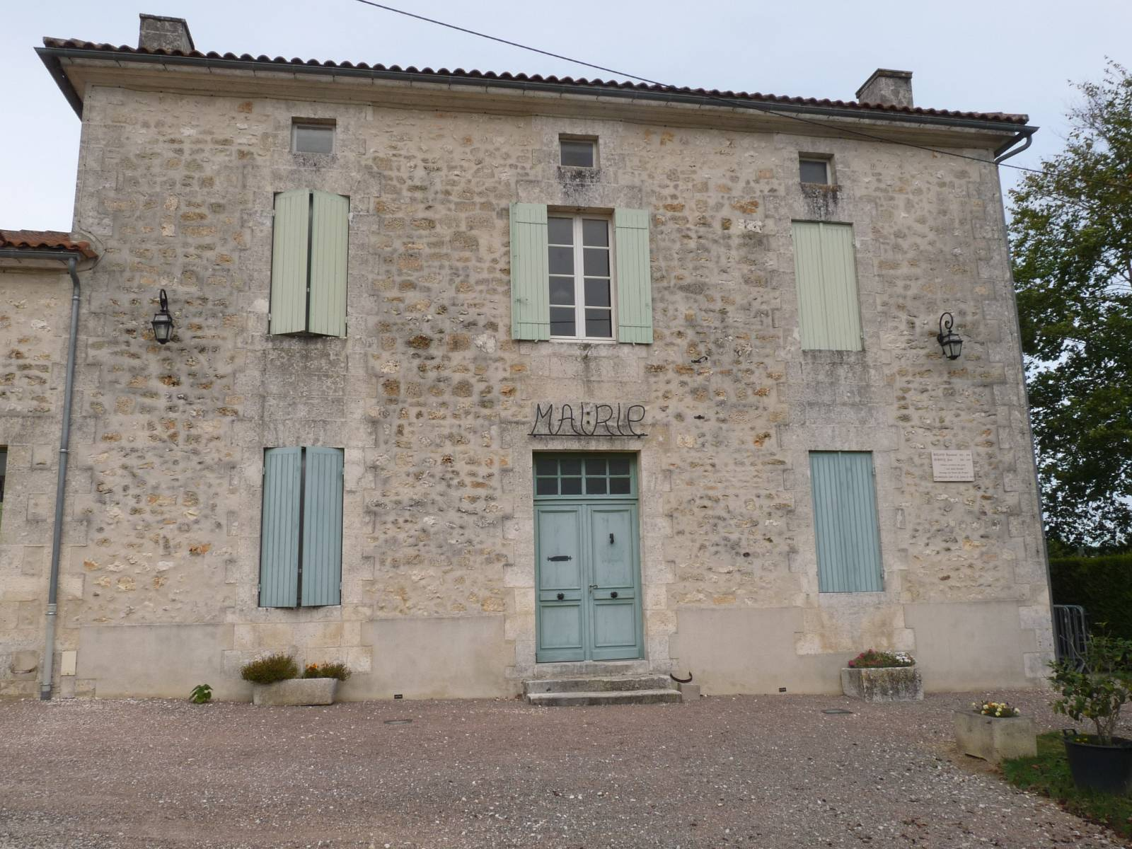 mairie de Ste-Croix-de-Mareuil, Dordogne, France